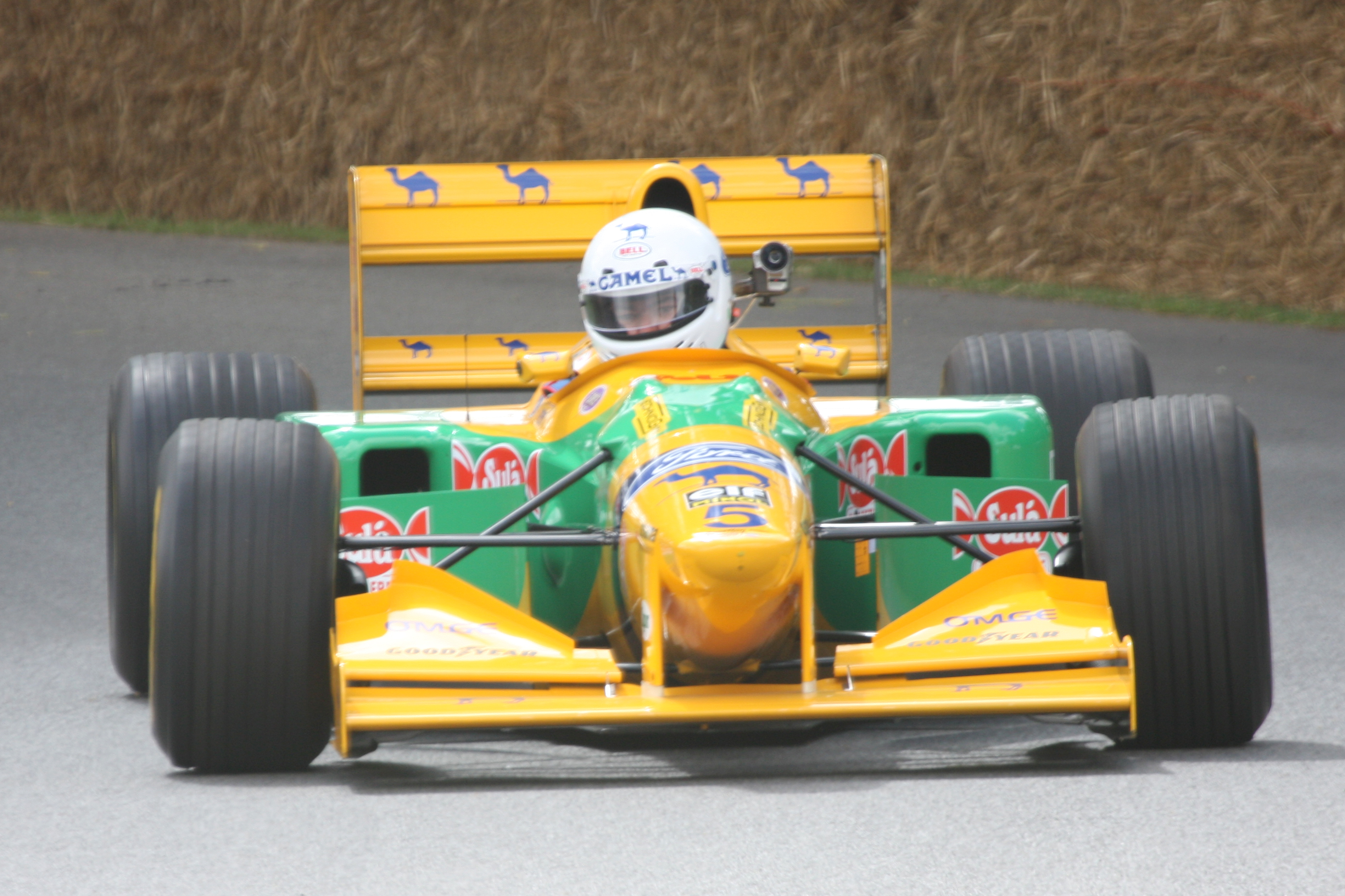 1993 Benetton-Ford B193